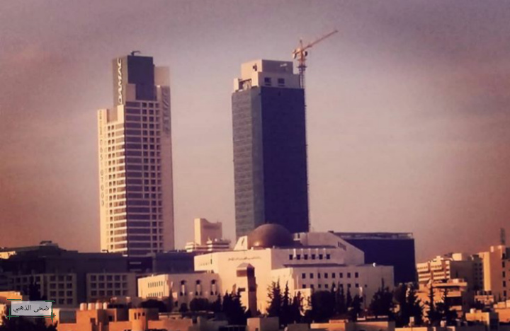 قصر العدل